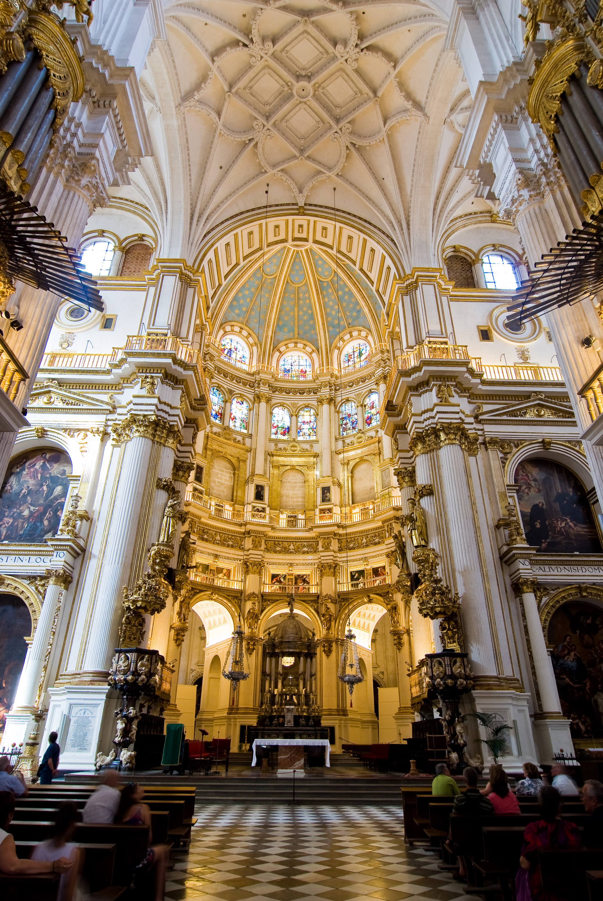 Capilla Mayor (Cathédrale de l'Incarnation, Grenade, Espagne)